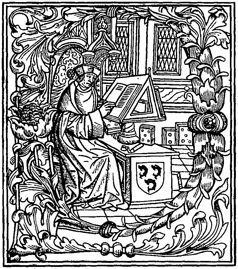 Gravure, page 2 des Les grandes croniques de Bretaigne composées en 1514 (1886).